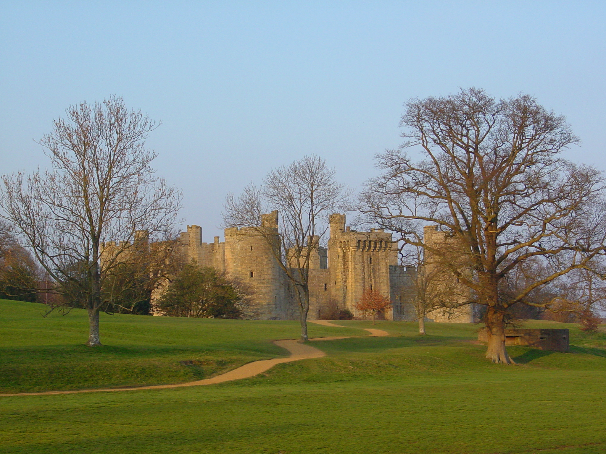 Bodiam Castle